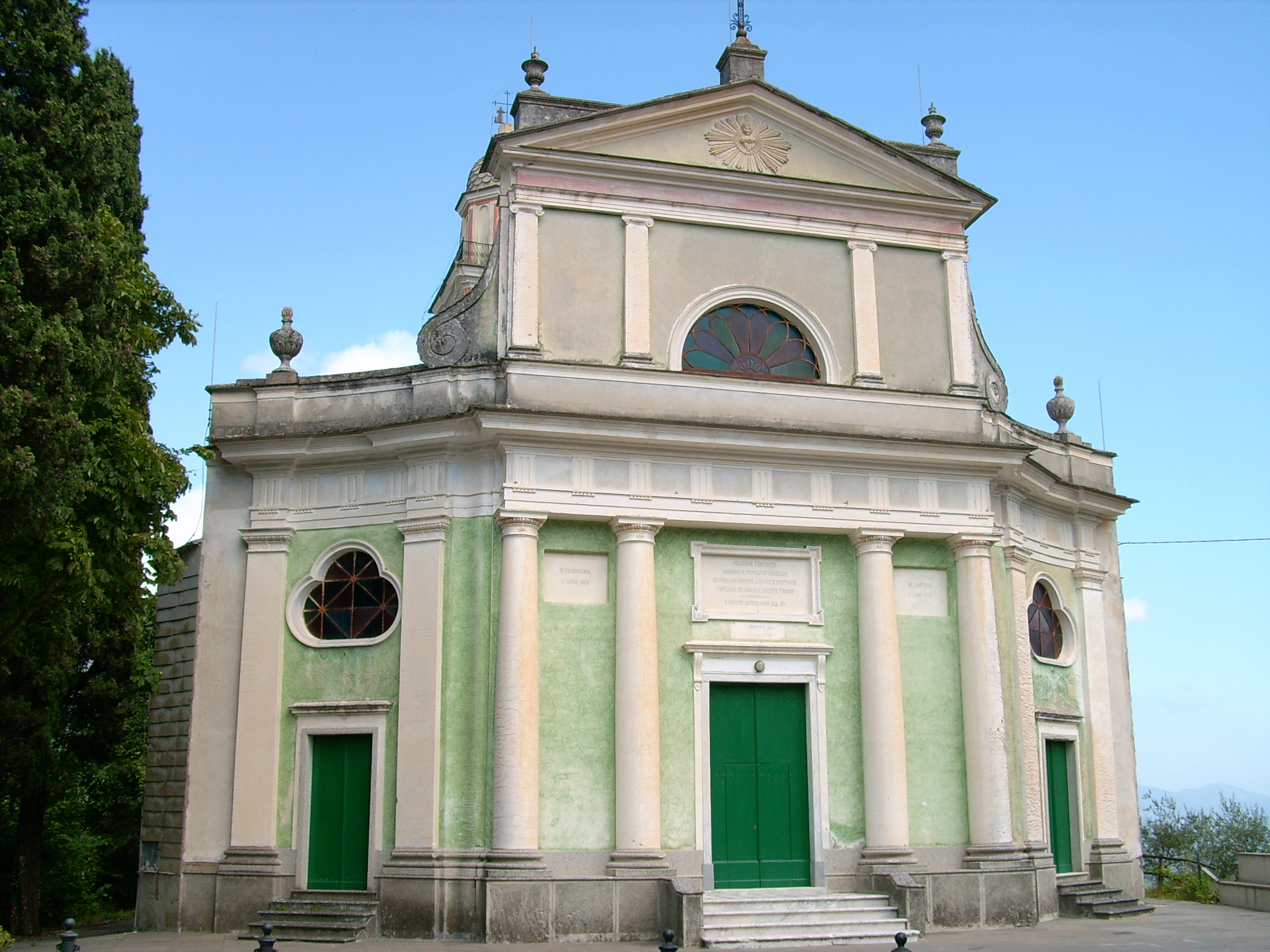 Chiesa di sant'Antonio presso Coreglia Ligure, Liguria, Italia